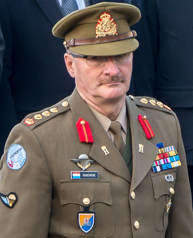 D'Journée de la commémoration nationale erënnert un d'Lutte vum Lëtzebuerger Vollek géint d'Nazi-Okkupatioun am Zweete Weltkrich. D'Commemoratioun ass am Oktober, um Sonnden deen am notse beim 10. Oktober läit. Se erënnert domat un den Echec vun der Personenstandsaufnahme vum 10. Oktober 1941. Feierlechkeete ginn a ville Gemengen ofgehal, an der Stad Lëtzebuerg sinn et der gläich dräi: Beim Nationalmonument vun der Lëtzebuerger Solidaritéit um Kanounenhiwwel, bei der Gëlle Fra op der Constitutiounsplaz a beim Hinzerter Kräiz um Nikloskierfecht. Um Kanounenhiwwel huet de Grand-duc den 9. Oktober 2016 e Kranz néierleeë gelooss an d'Erënnerungsflam vrum Monument raniméiert. No der Heemecht huet hien zesumme mam Chamberpresident, dem Premier an der Stater Buergermeeschtesch d'Monument besicht. Mat der Begréissung vun de Fändeldréier, de Vertrieder vun de patrioteschen Organisatiounen a vun den Holocaust-Affer, den auslänneschen Ambassadeuren, den Autoritéite vu Staat a Gesellschaft an och de Studente vum Stater Kolléisch an der Universitéit goung d'Zeremonie hei zu Enn. Den Alain Duschène, Chef d'État-Major adjoint vun der Arméi.